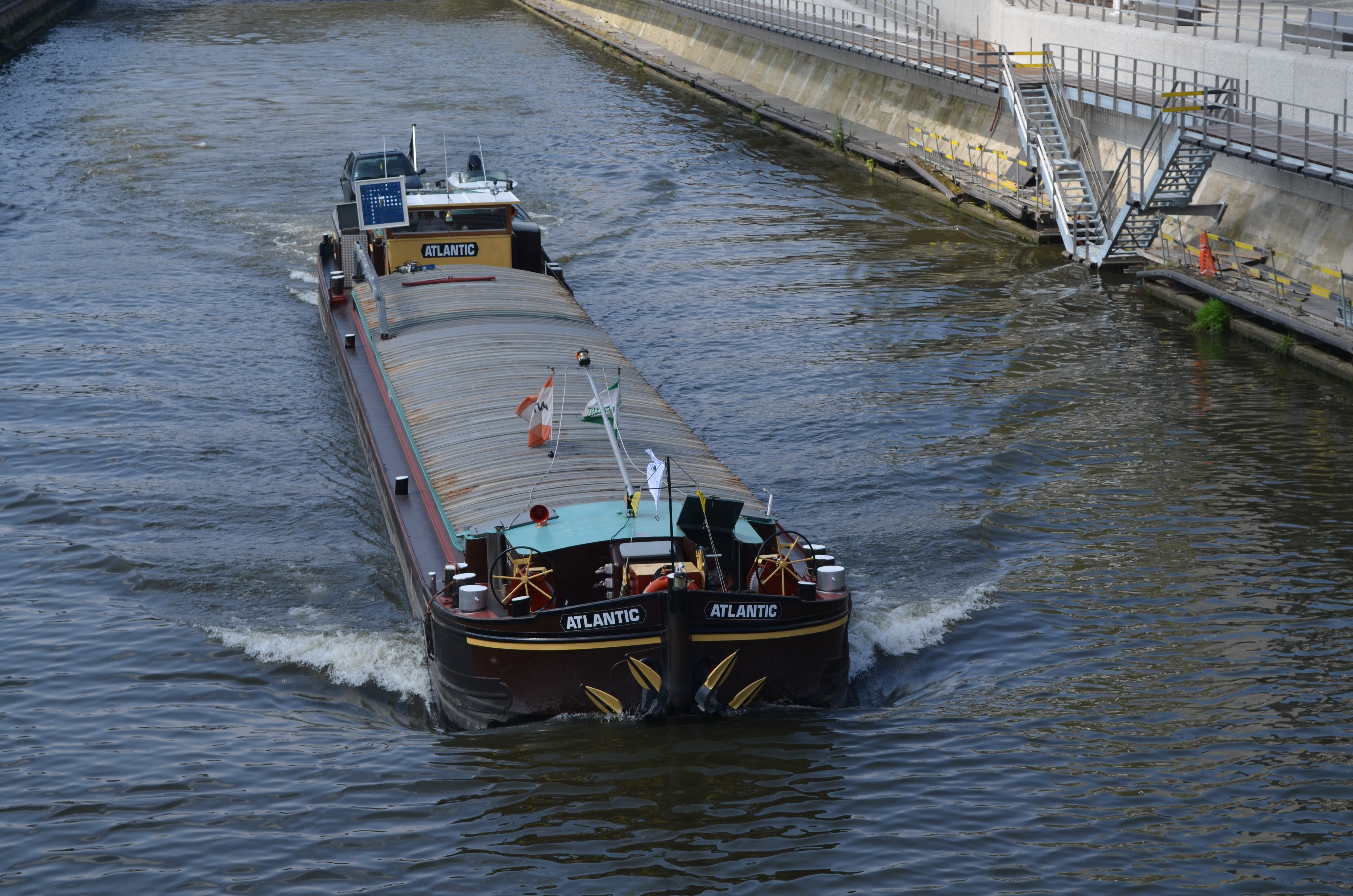 Charleroi (Belgique) - Péniche « Atlantic » (Li9725 F) sur la Sambre au niveau du Quai de Flandre.